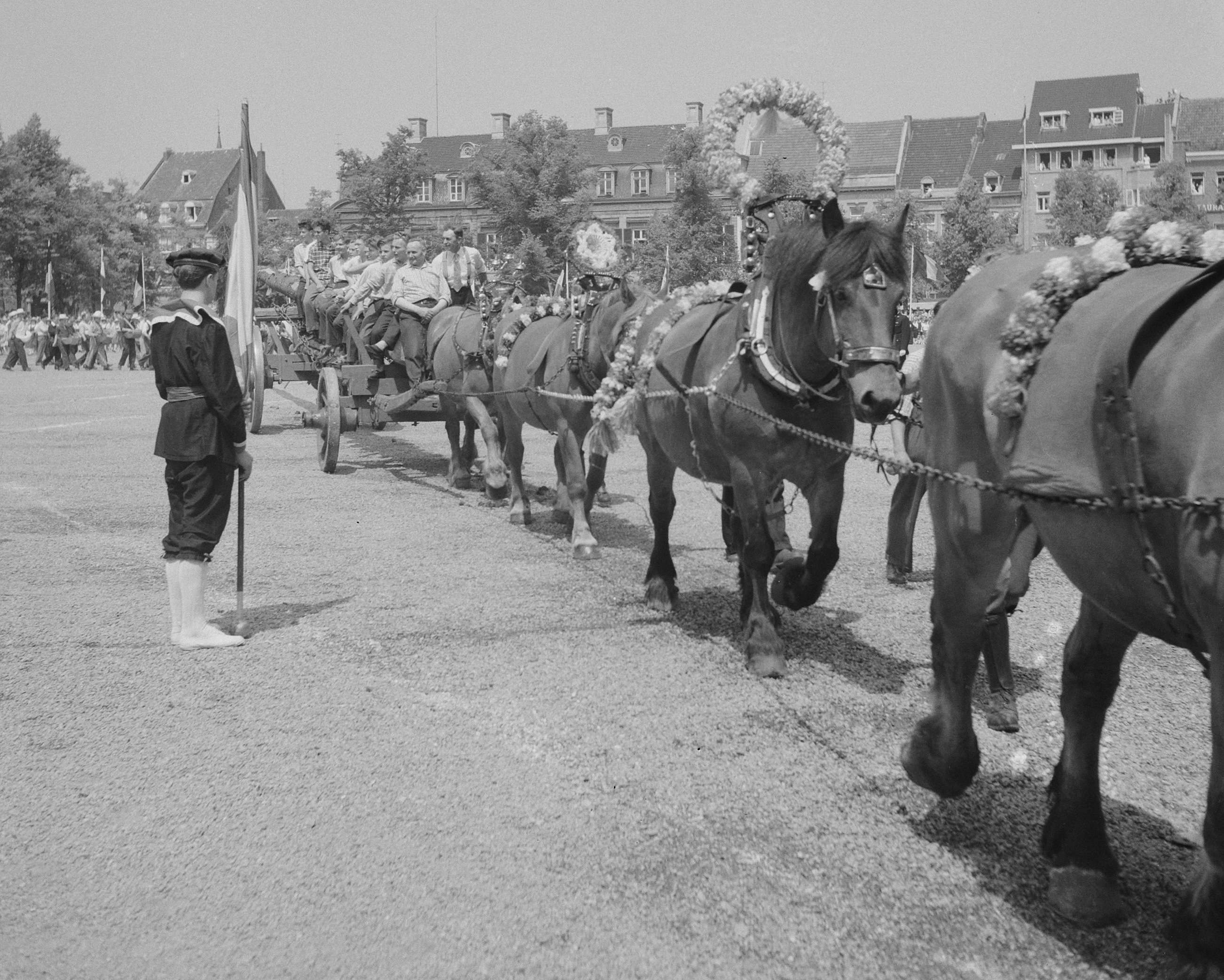 Collectie / Archief : Fotocollectie Anefo Reportage / Serie : [ onbekend ] Beschrijving : Vierde dag van het bezoek van Koning Boudewijn bezoek aan Maastricht en omgeving Datum : 11 juli 1959 Fotograaf : Noske, J.D. / Anefo Auteursrechthebbende : Nationaal Archief Materiaalsoort : Negatief (zwart/wit) Nummer archiefinventaris : bekijk toegang 2.24.01.03 Bestanddeelnummer : 910-5185